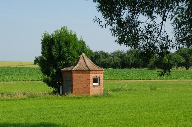 Brunnenstube in Abstetterhof, 12 km from Heilbronn, Deutschland (Zone 32).